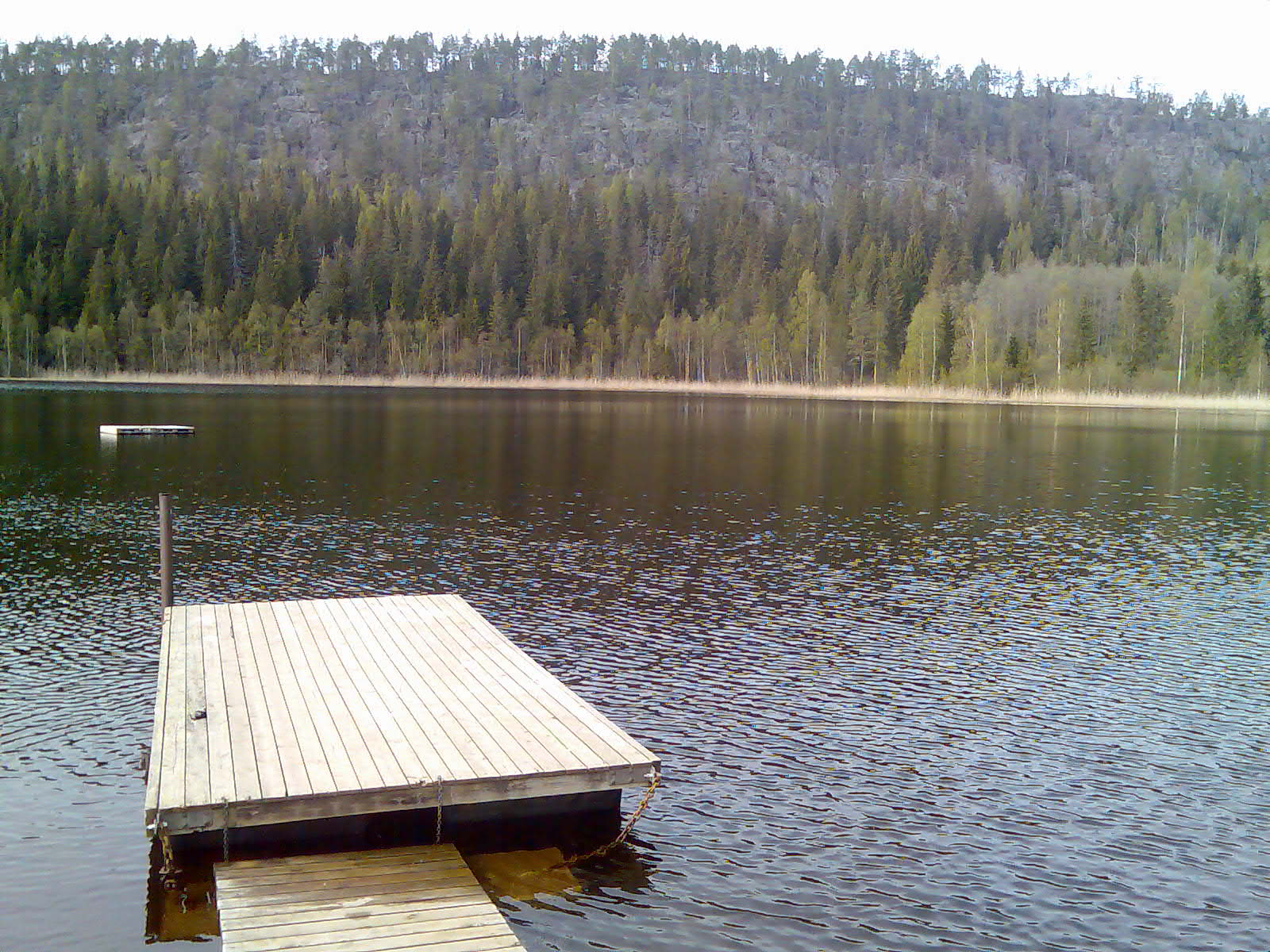 En sommarbild av Hulitjärnen i Sundsvall. Här är härliga att ta ett dopp.